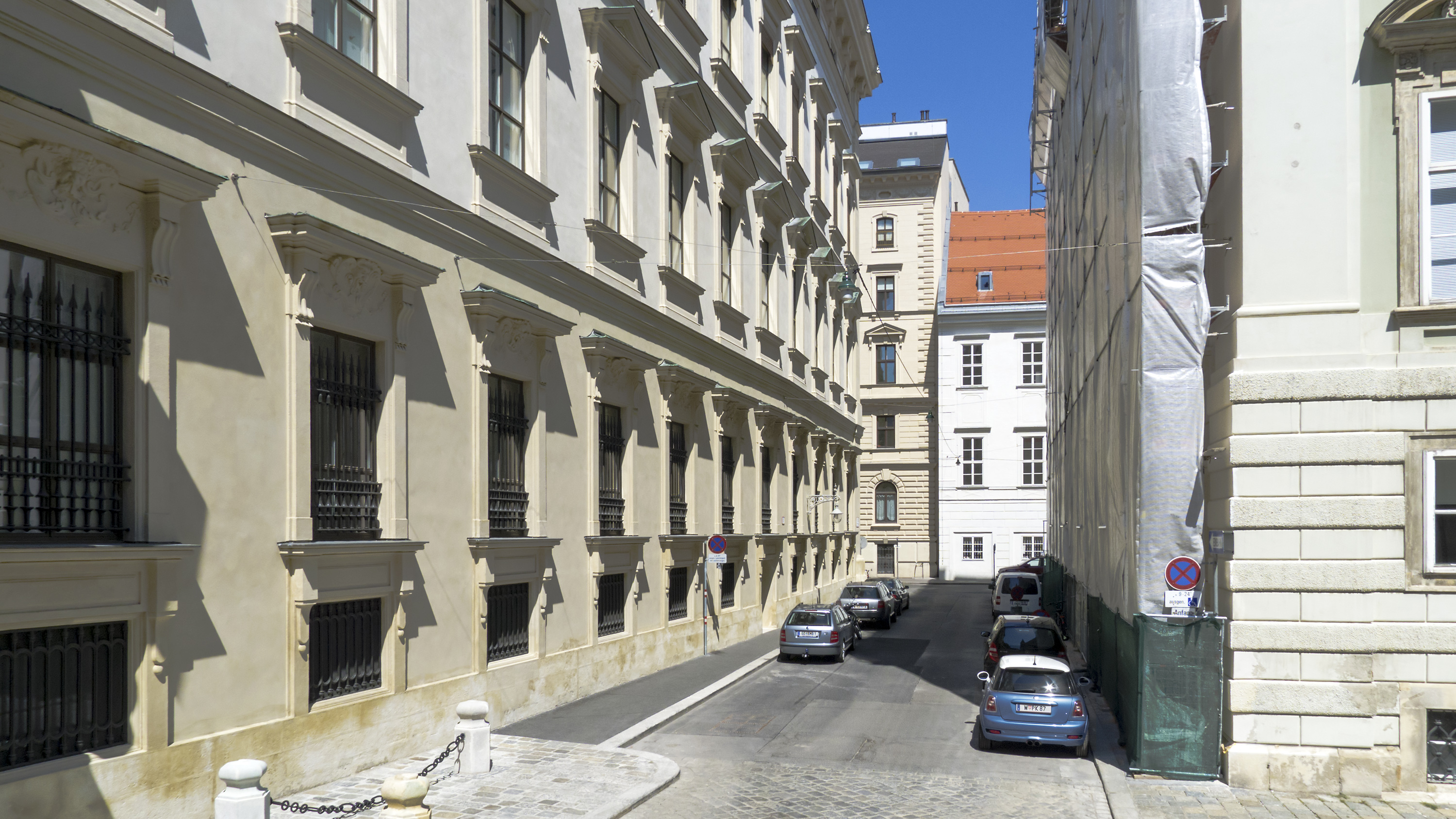 Abraham-a-Sancta-Clara-Gasse in Wien 1 beim Minoritenplatz Richtung Nordwesten